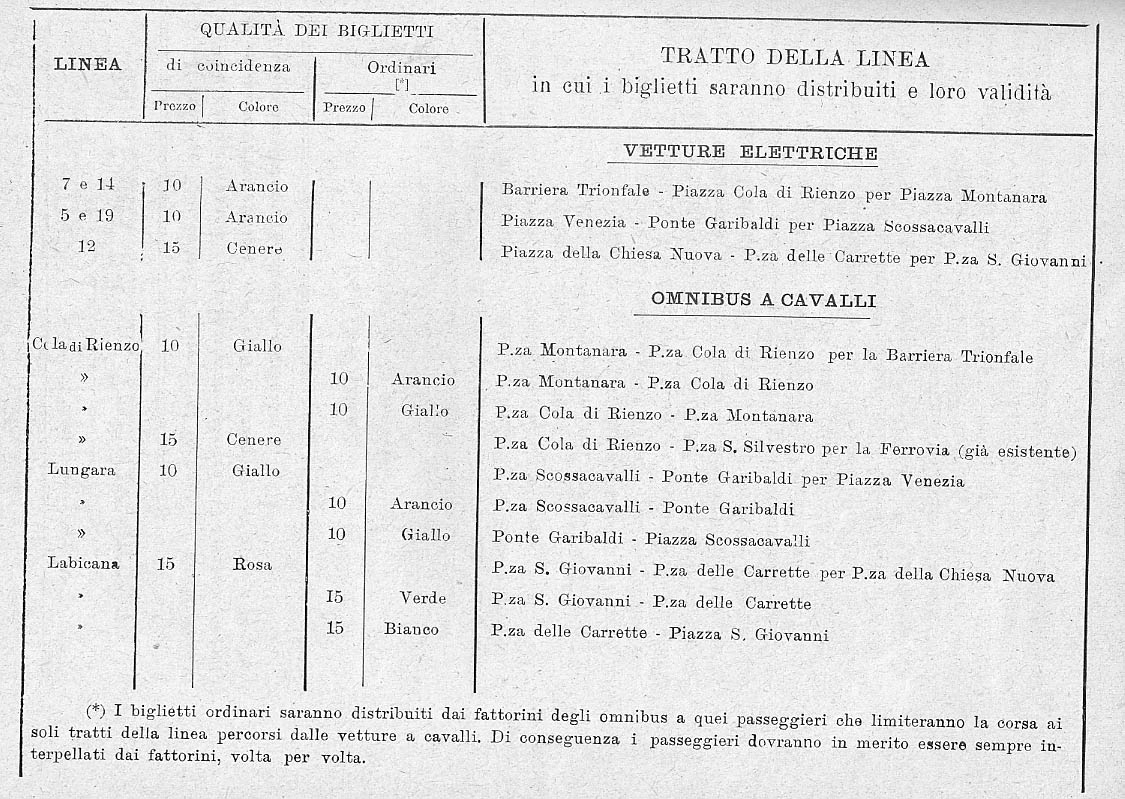 Ordine di servizio per la cessazione totale della trazione a cavalli.